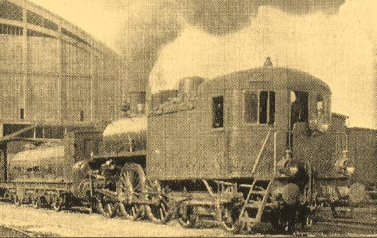 Foto d'epoca della locomotiva a vapore gruppo 500 RA, poi 670 FS